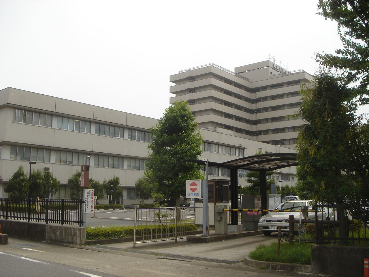 Gifu_Municipal_Hospital(岐阜市民病院),Gifu,Gifu,Japan(岐阜県岐阜市)で北東側より撮影。